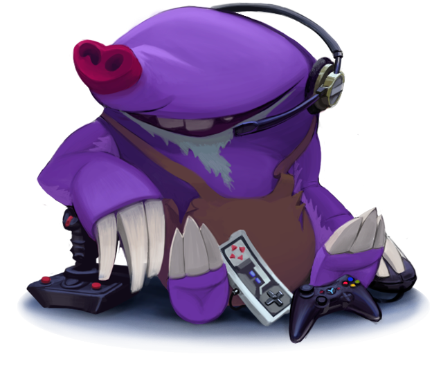 BioGaming character